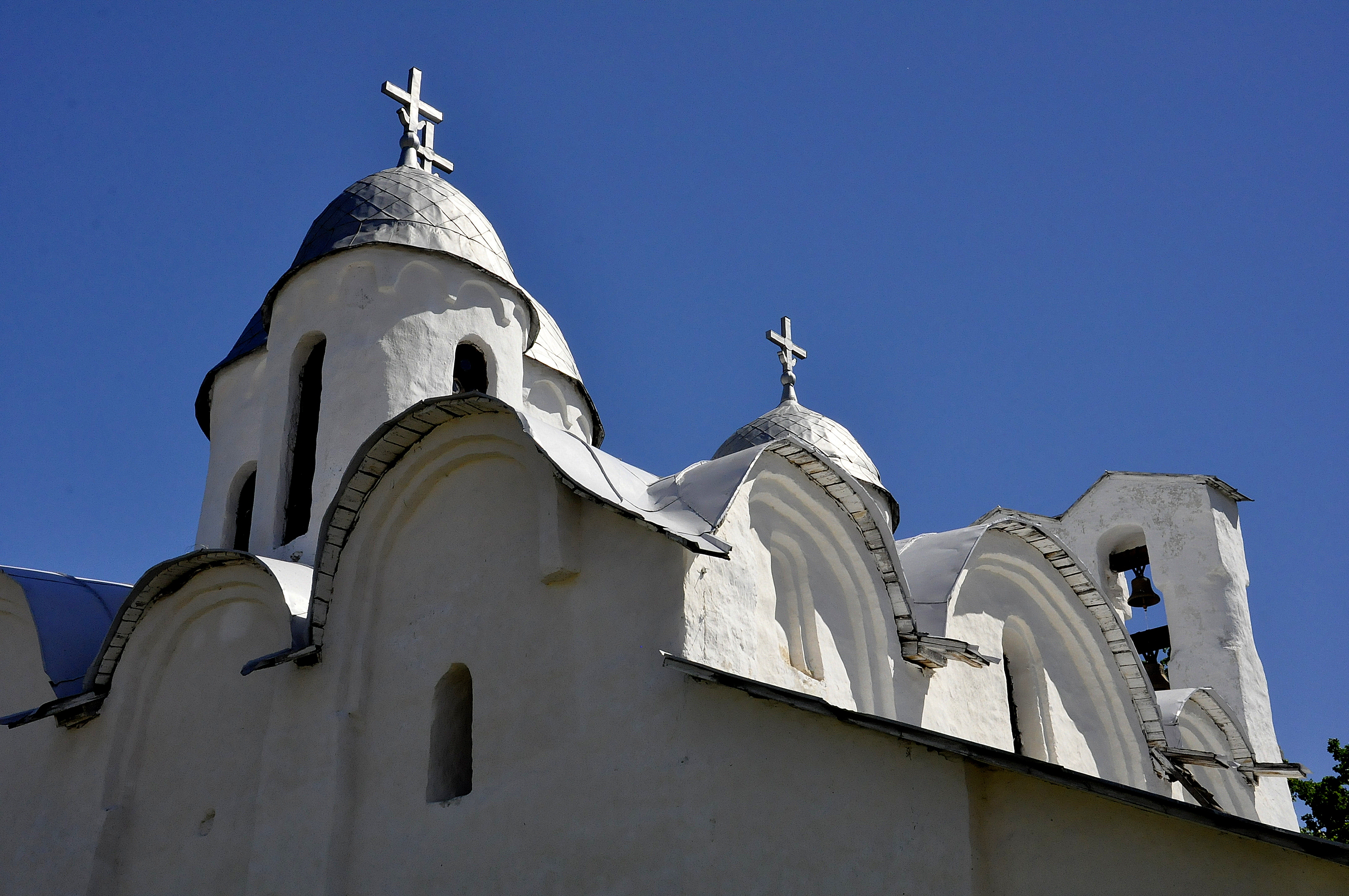 Собор Иоанна Предтечи (Псковская область, Псков, Горького улица, 1)